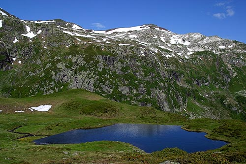 Bergseelein ob dem Murgsee